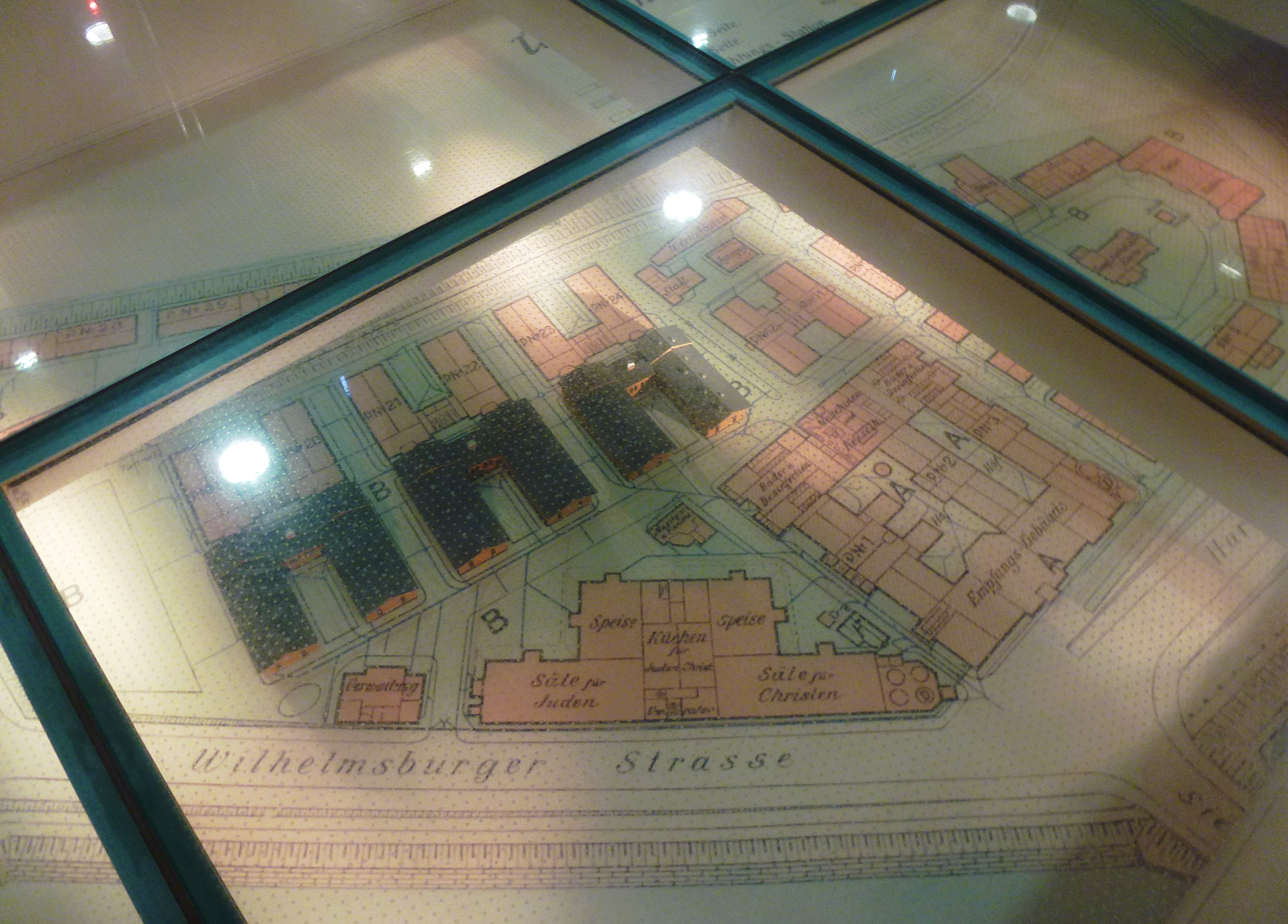 BallinStadt, Plan der ursprünglichen Anlage unter dem Fußboden in der Eingangshalle